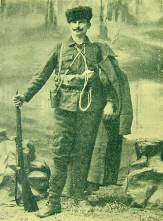 Георги Белев.